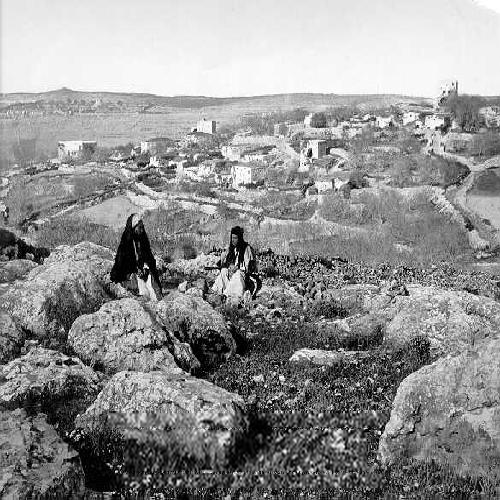 בית - אל, מראה כללי, ( ת. מ. 1895) .